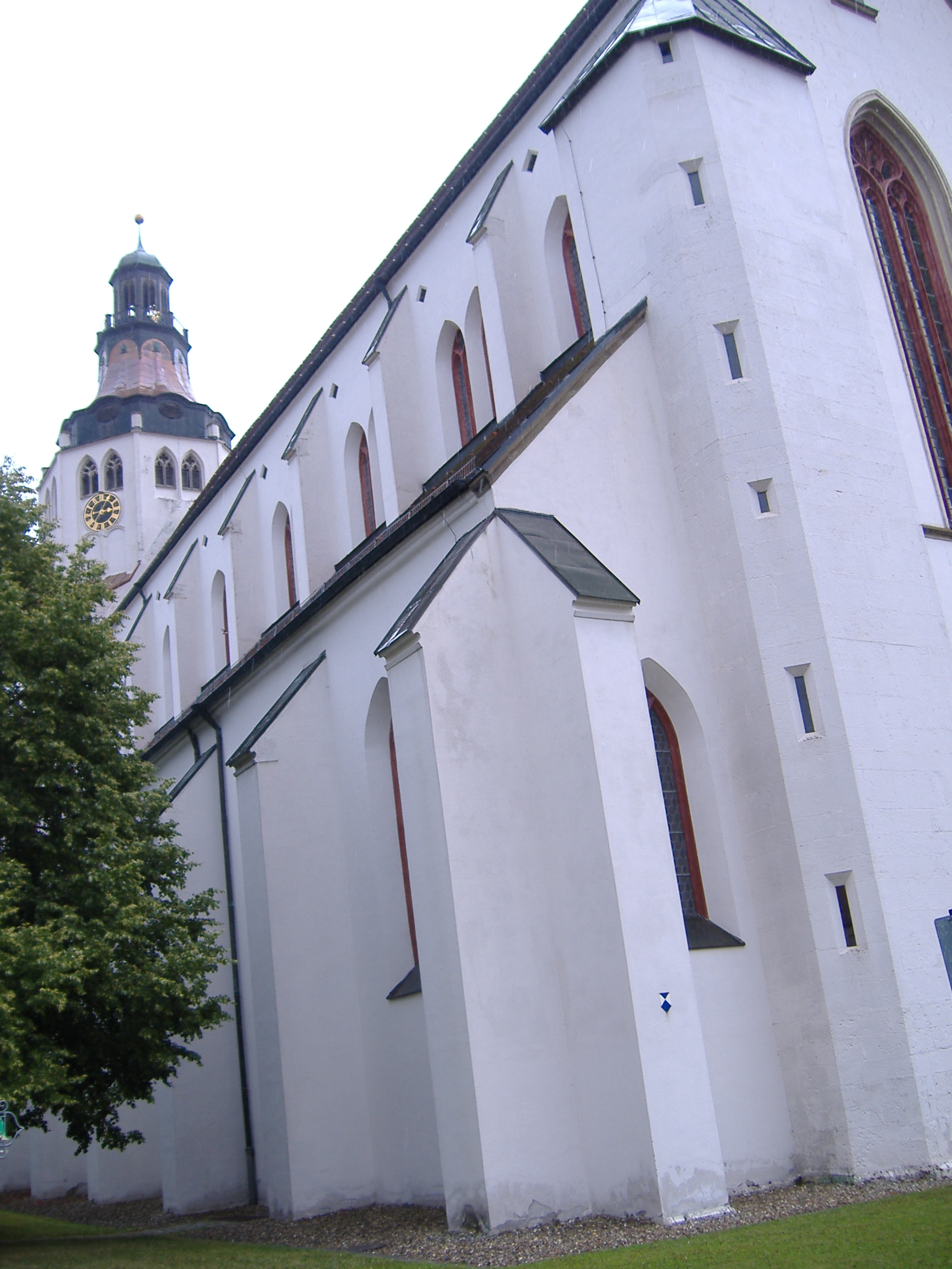 Klosterkirche Kaisheim